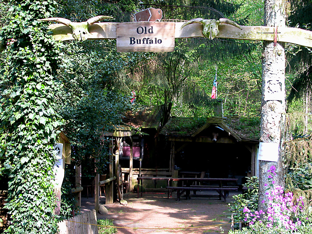 Аттракцион "Буффало", Дорстен-Раде